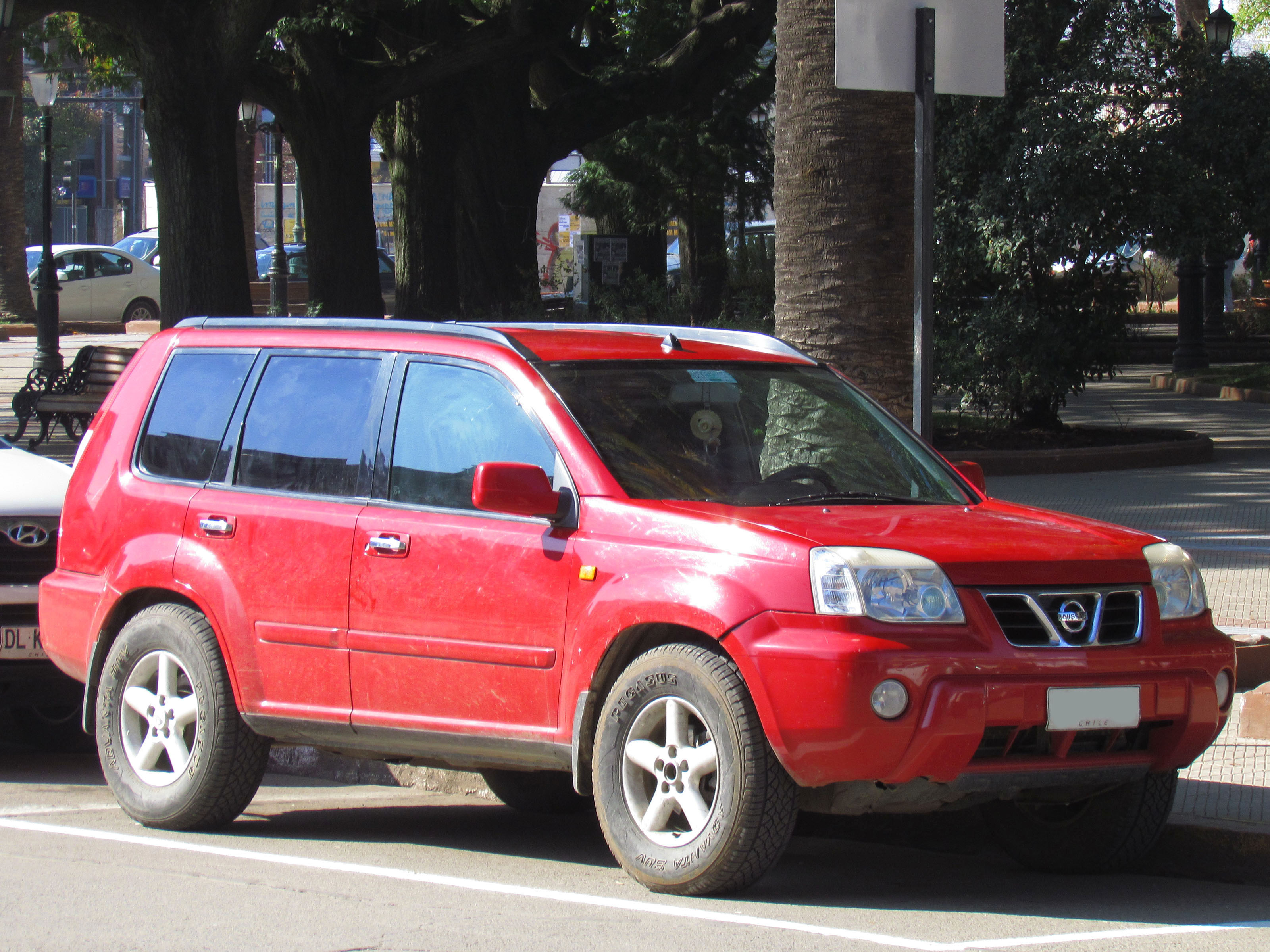 Nissan X-Trail 2.5X 2002